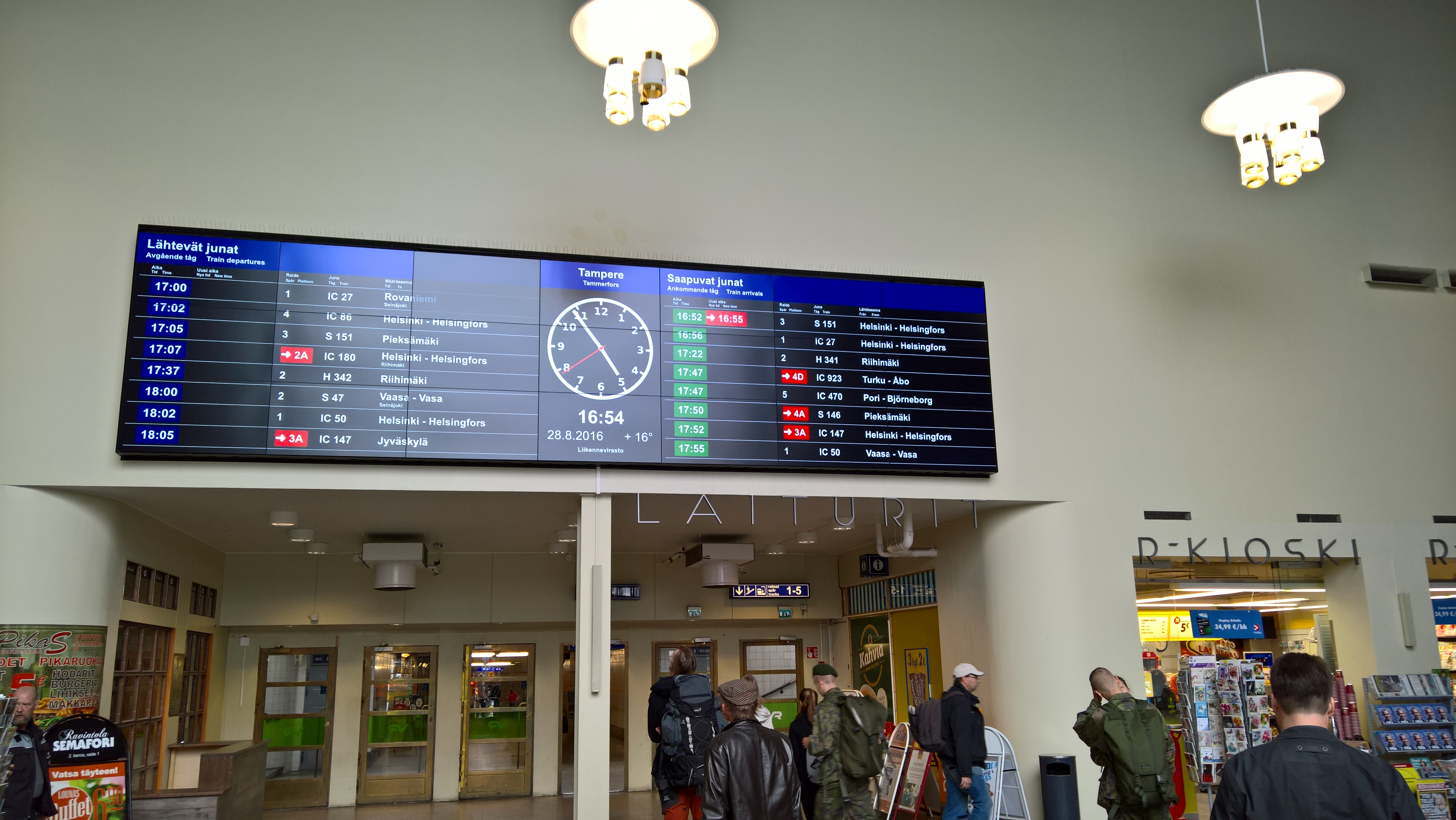 Tampereen rautatieaseman asemahalliin joulukuussa 2015 asennettu, digitaalisiin näyttöihin perustuva saapuvien ja lähtevien junien näyttö.